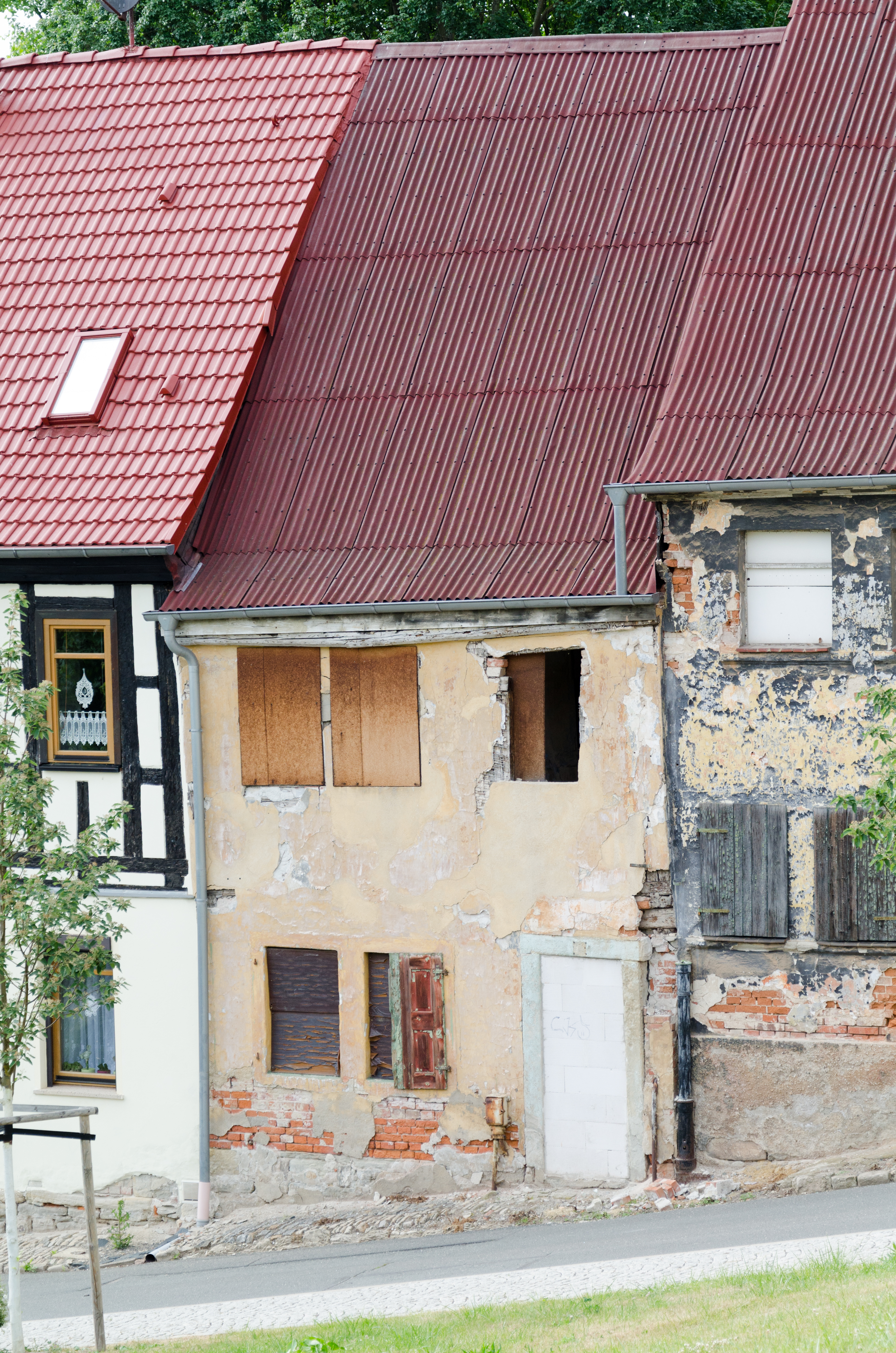 Zeitz, Scharrenstraße 12